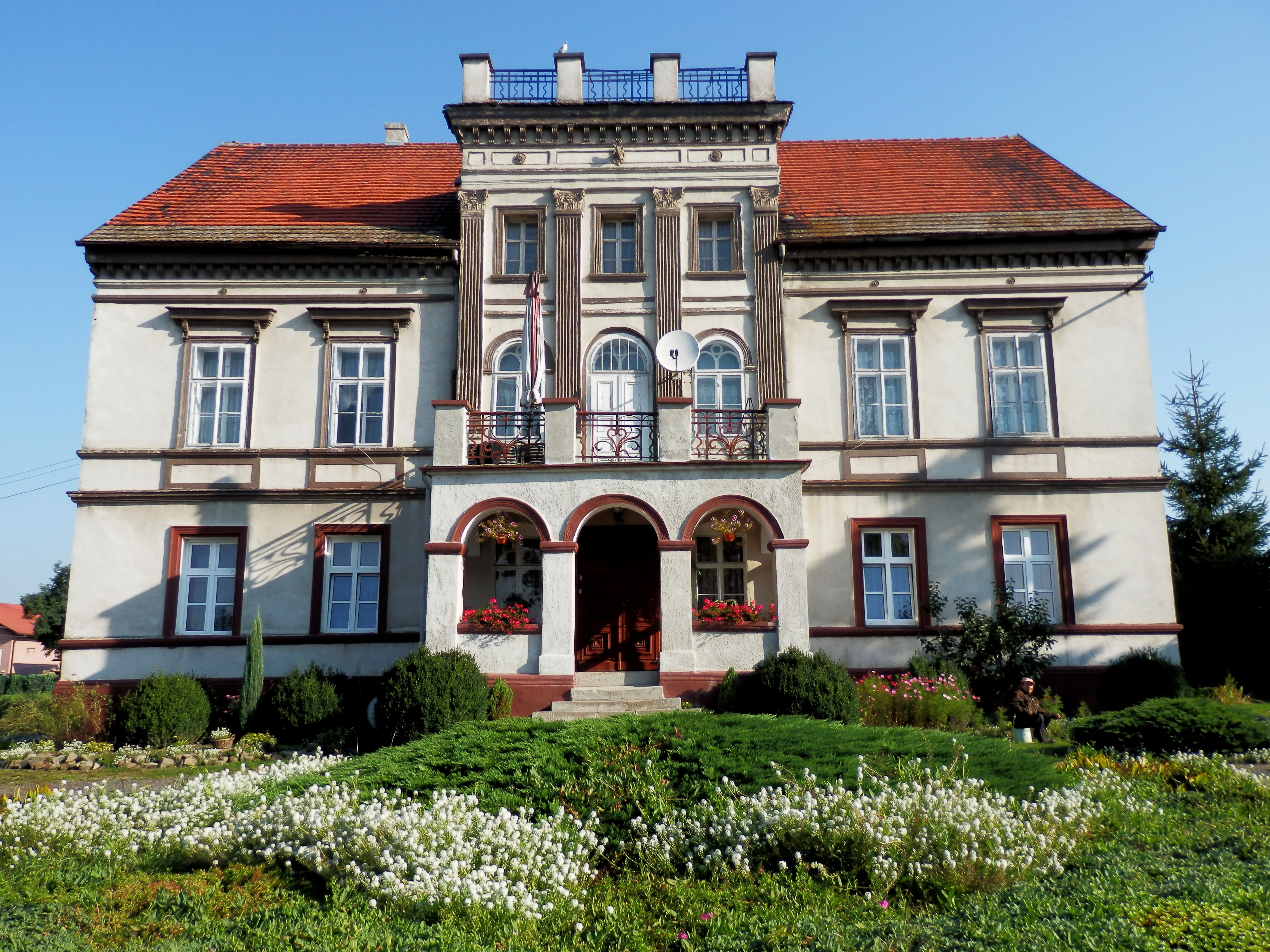 Żory, dom, XIX/XX w.